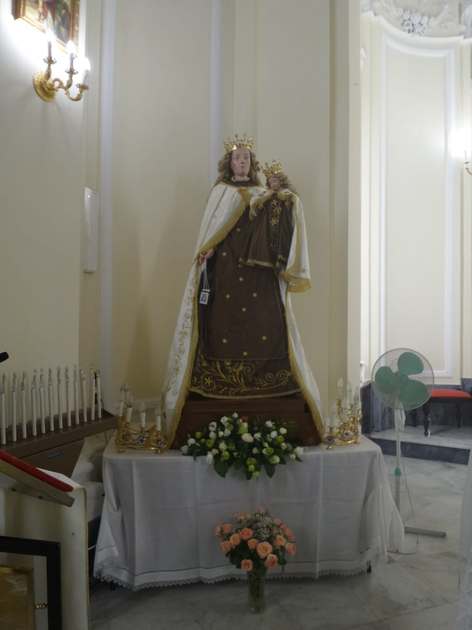 Statua in cartapesta della Vergine del Carmelo con Gesù Bambino fra le sue braccia esposta vicino all'altare maggiore della chiesa omologa di Angri.